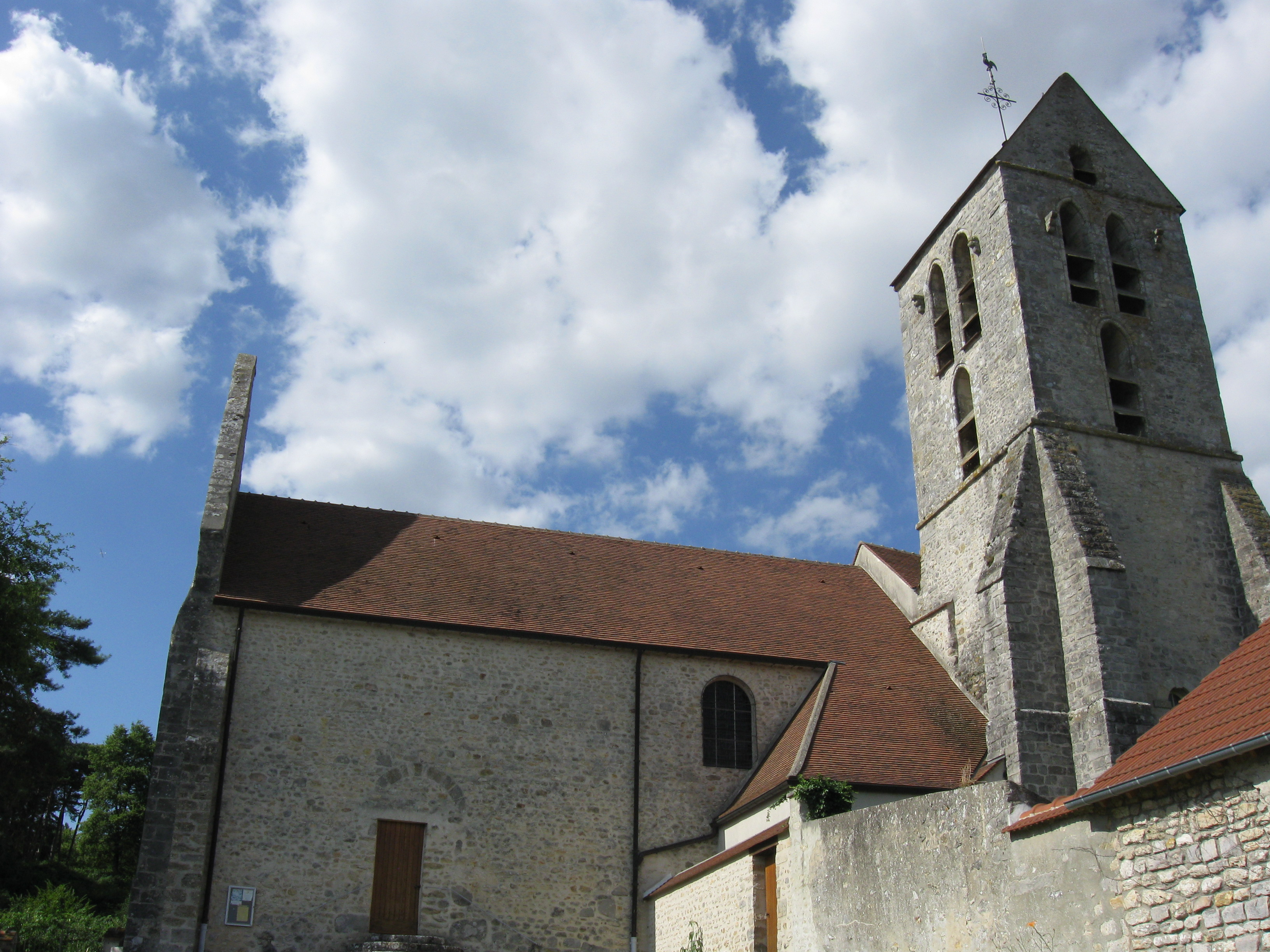 Église Saint-Martin de Nanteau-sur-Essonne. (Seine-et-Marne, région Île-de-France).